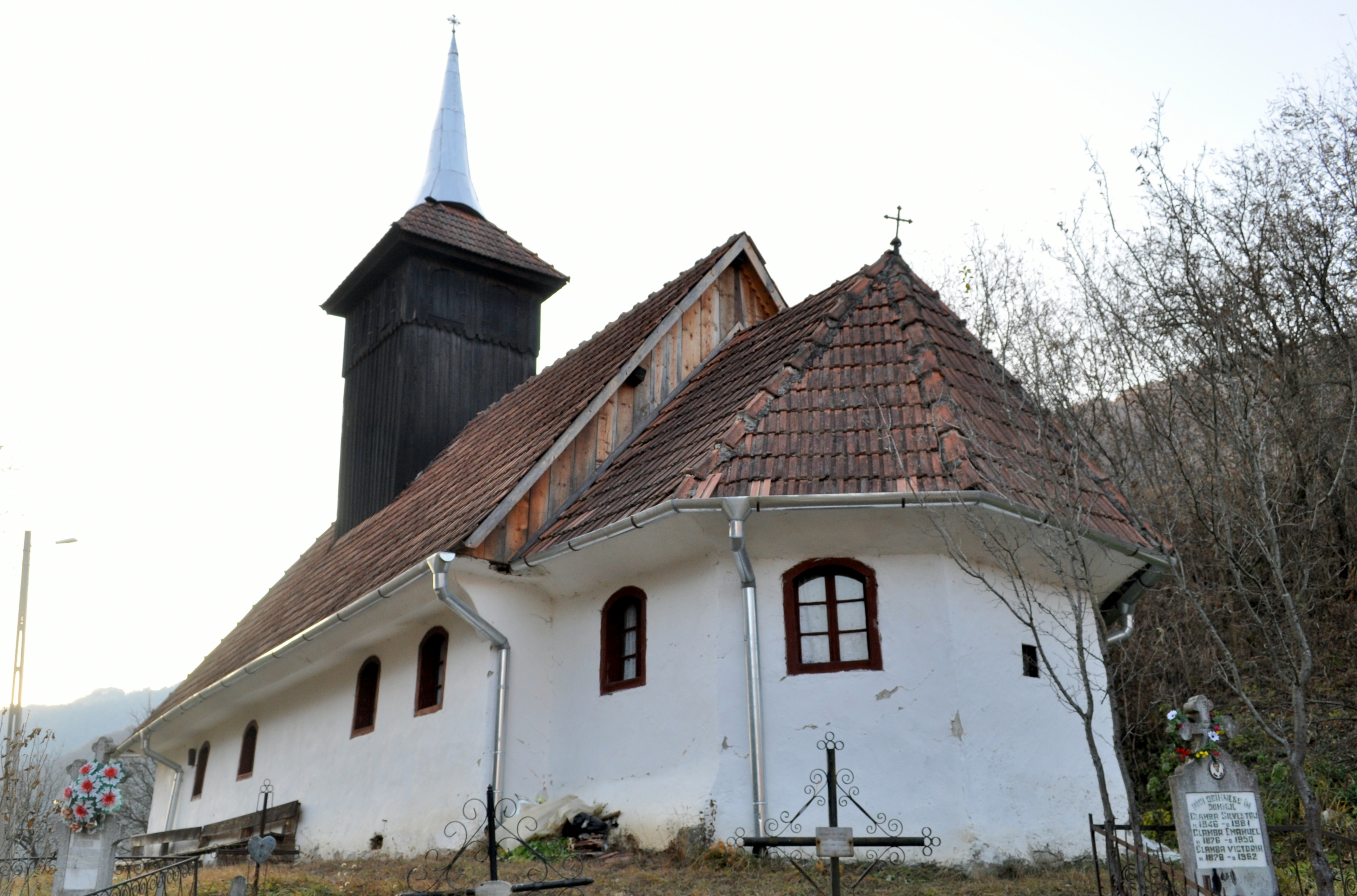 Întregalde, județul Alba